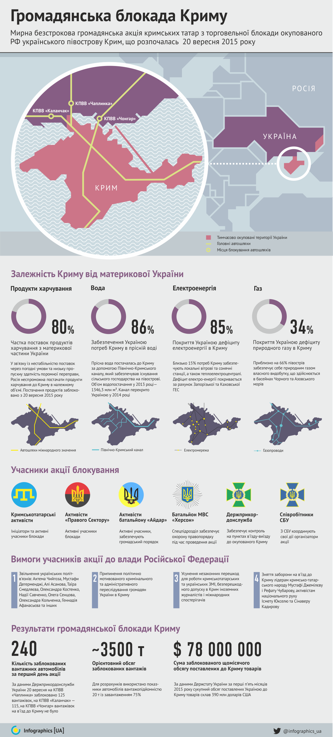 Громадянська громада Криму - інфографіка від InphormNapalm